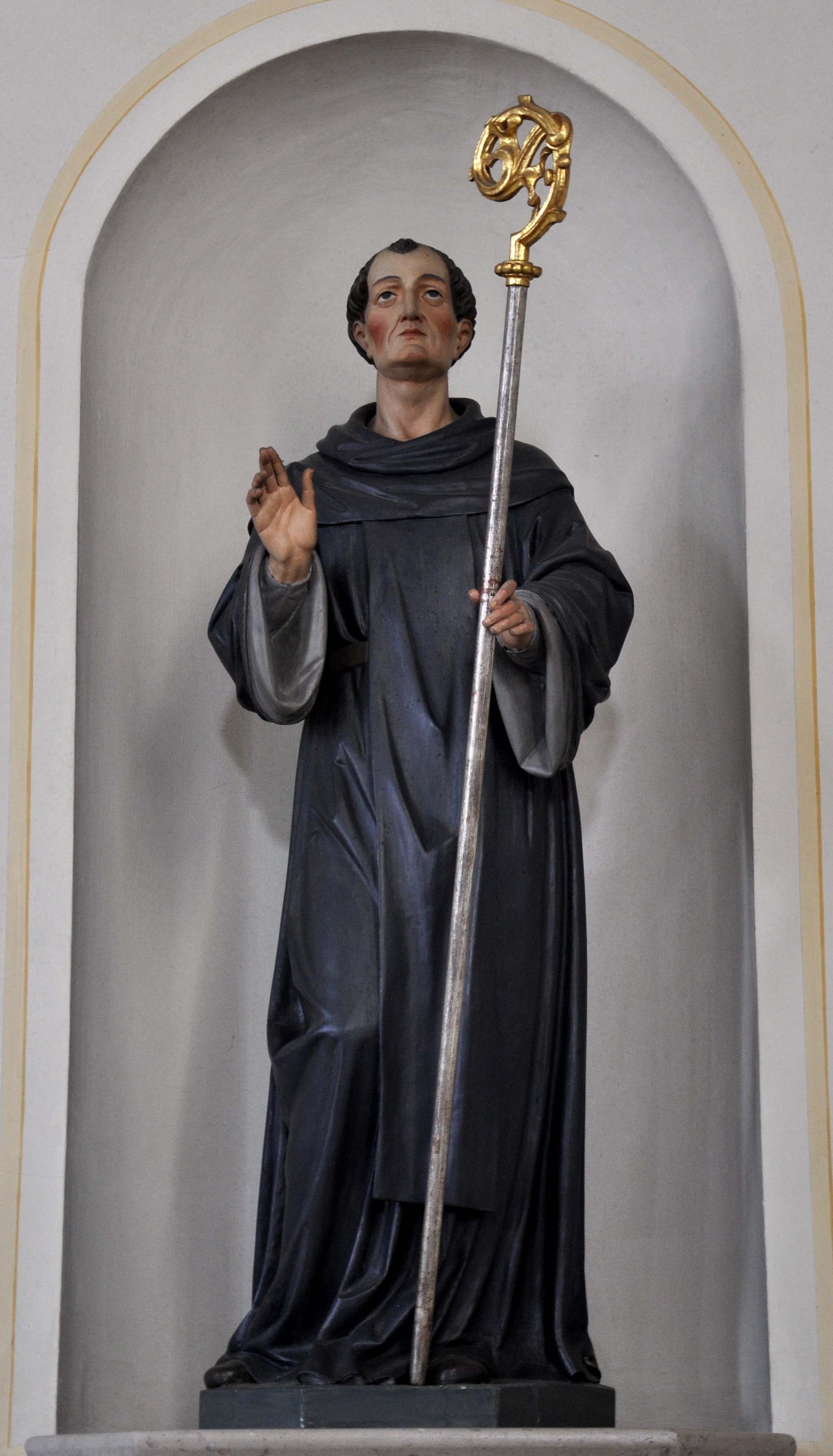 Katholische Pfarrkirche St. Columban, Bavendorf (Ortschaft Taldorf, Stadt Ravensburg) Hl. Columban (19. Jh.?)